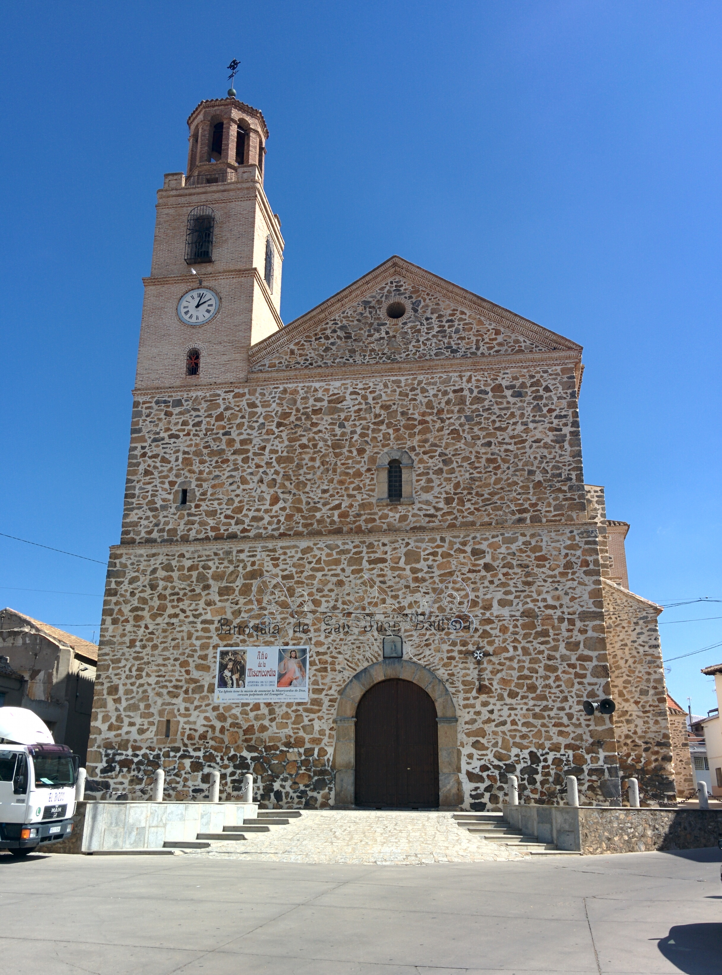 Iglesia de San Juan Bautista, Urda (Toledo, España).